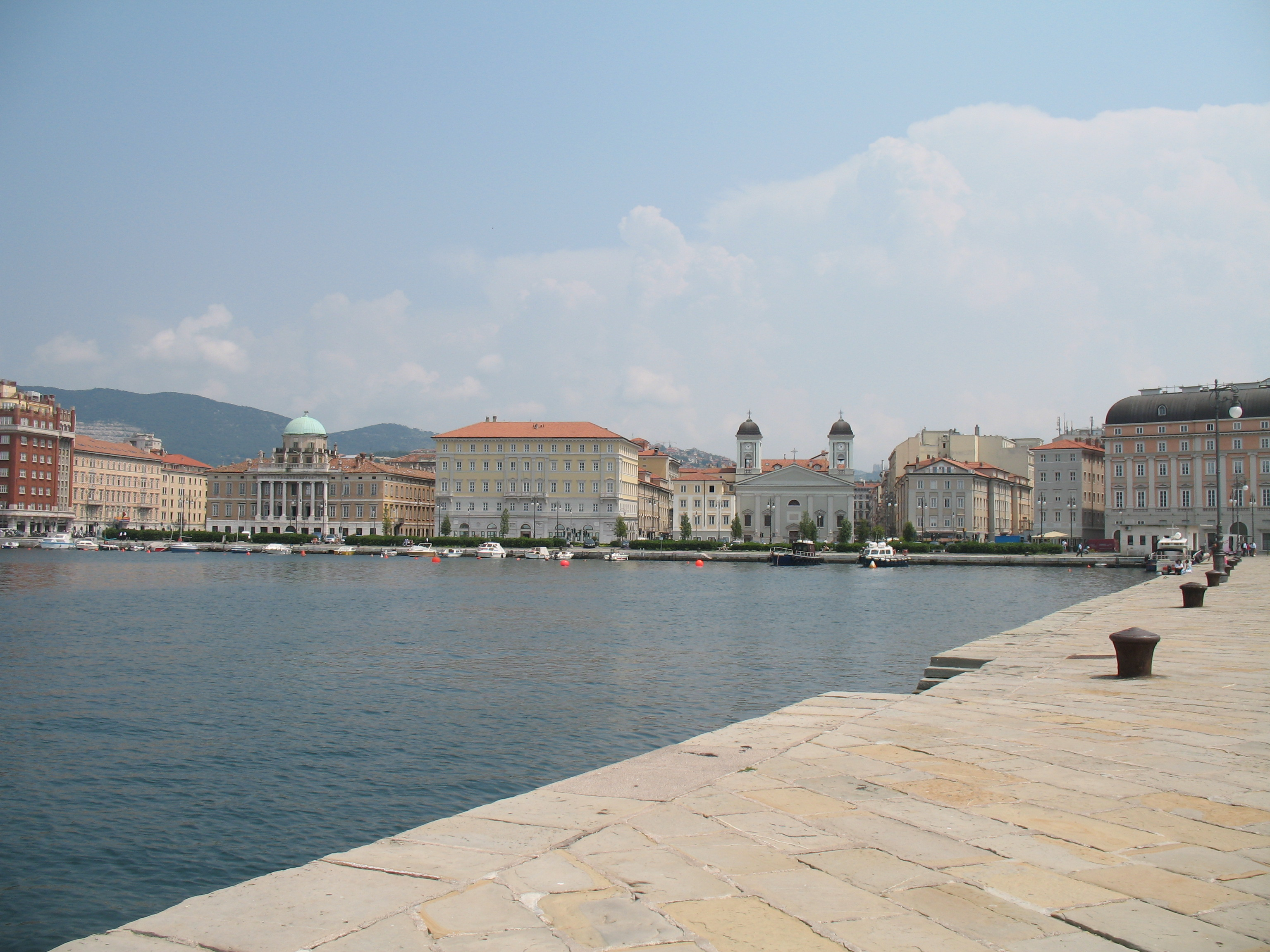 Immagine da Trieste, Friuli-Venezia Giulia, Italia.